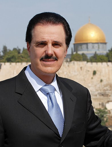 Dr. Michael D. Evans in Jerusalem